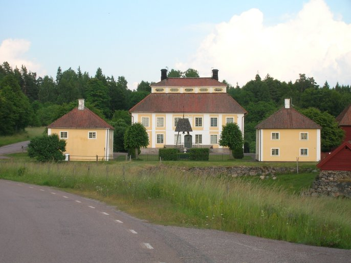 Godegårds herrgård, built 1725, Motala kommun, Sweden.